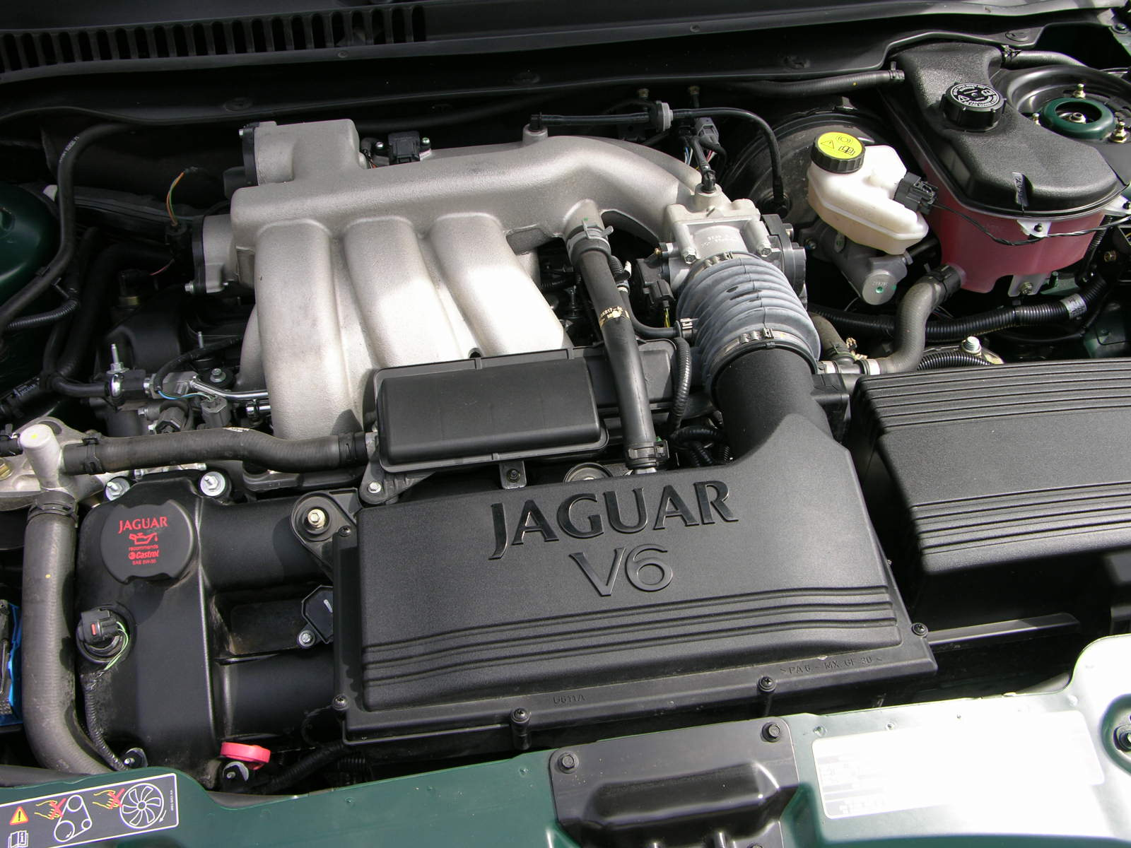 Jaguar XKR